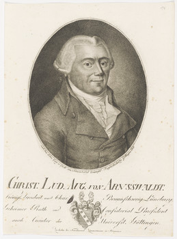 Bildnis des Christ. Lud. Aug. von Arnsswaldt